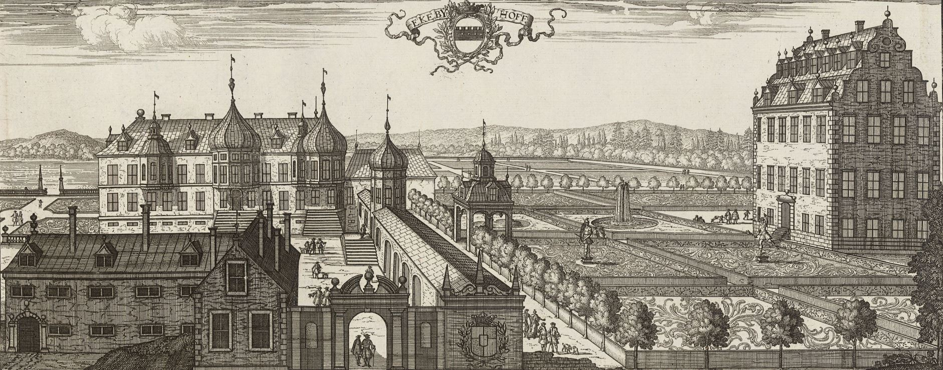 Ekebyhoff / [Herman Padtbrugge] Padtbrugge, Herman, 1656-1687 (Gravör) Dahlbergh, Erik, 1625-1703 (Kommissarie) Padtbrugge, Herman, 1656-1686-ca. Ekebyhoff